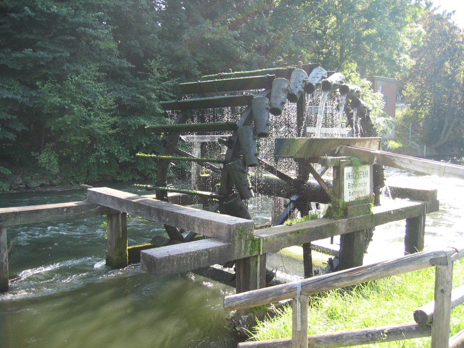 Modernes Schöpfrad nach historischem Vorbild in den Pegnitzwiesen in Nürnberg